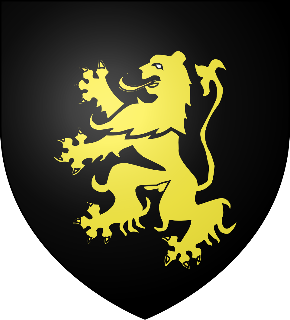 Blason de la ville de Pérouse (Territoire-de-Belfort) : De sable au lion d'or